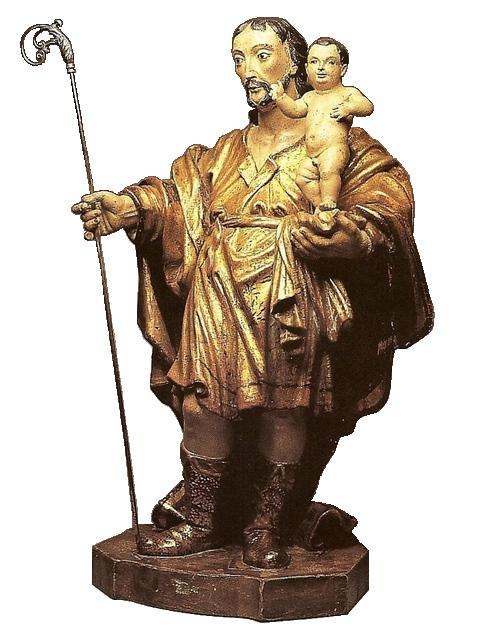 Antônio Francisco Lisboa, o Aleijadinho (c. 1730-1814) - São José de Botas, século XVIII (madeira policromada e dourada; altura: 57,5 cm). Acervo do Palácio dos Bandeirantes, São Paulo.